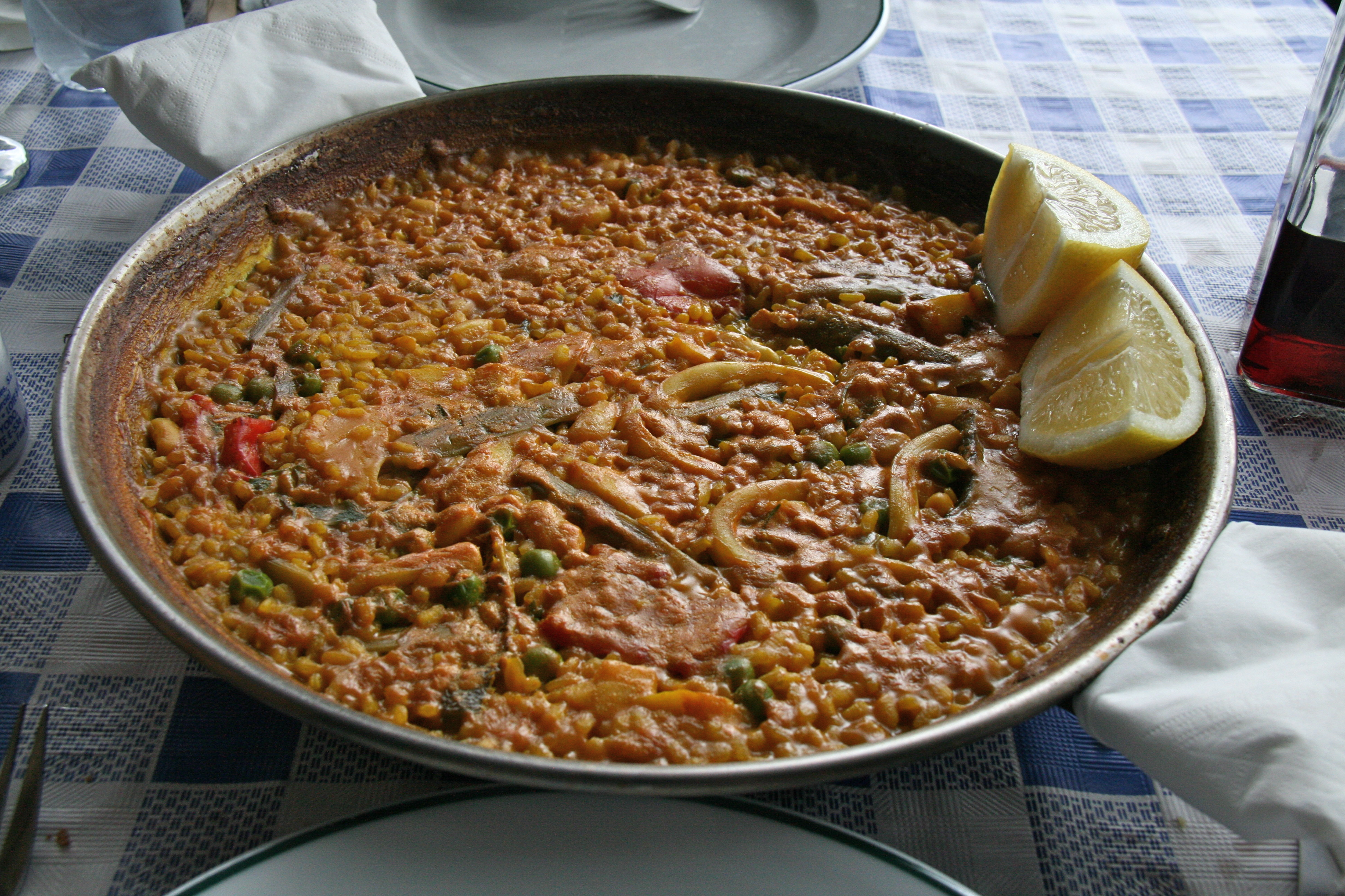 Arroz empedrado - „gespickter Reis“ - Murcia